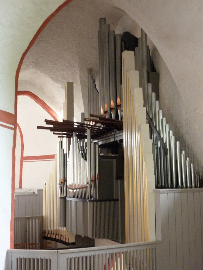 Evangelische Nikolaikirche in Siegen/Westfalen: Kirchenorgel, gesehen von der Empore.